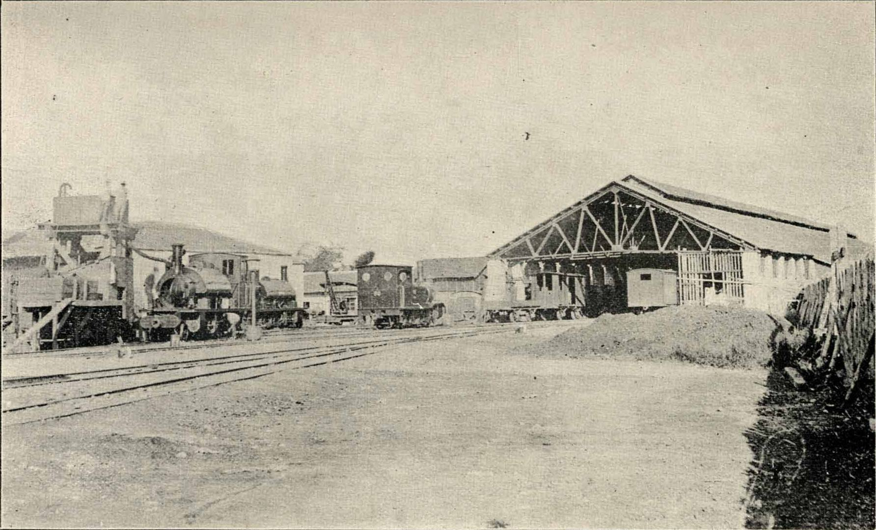 中文（台灣）: 清朝的臺北火車碼頭（臺北車站），後來成為日據初期的北門車站，本建築於1923年拆除。